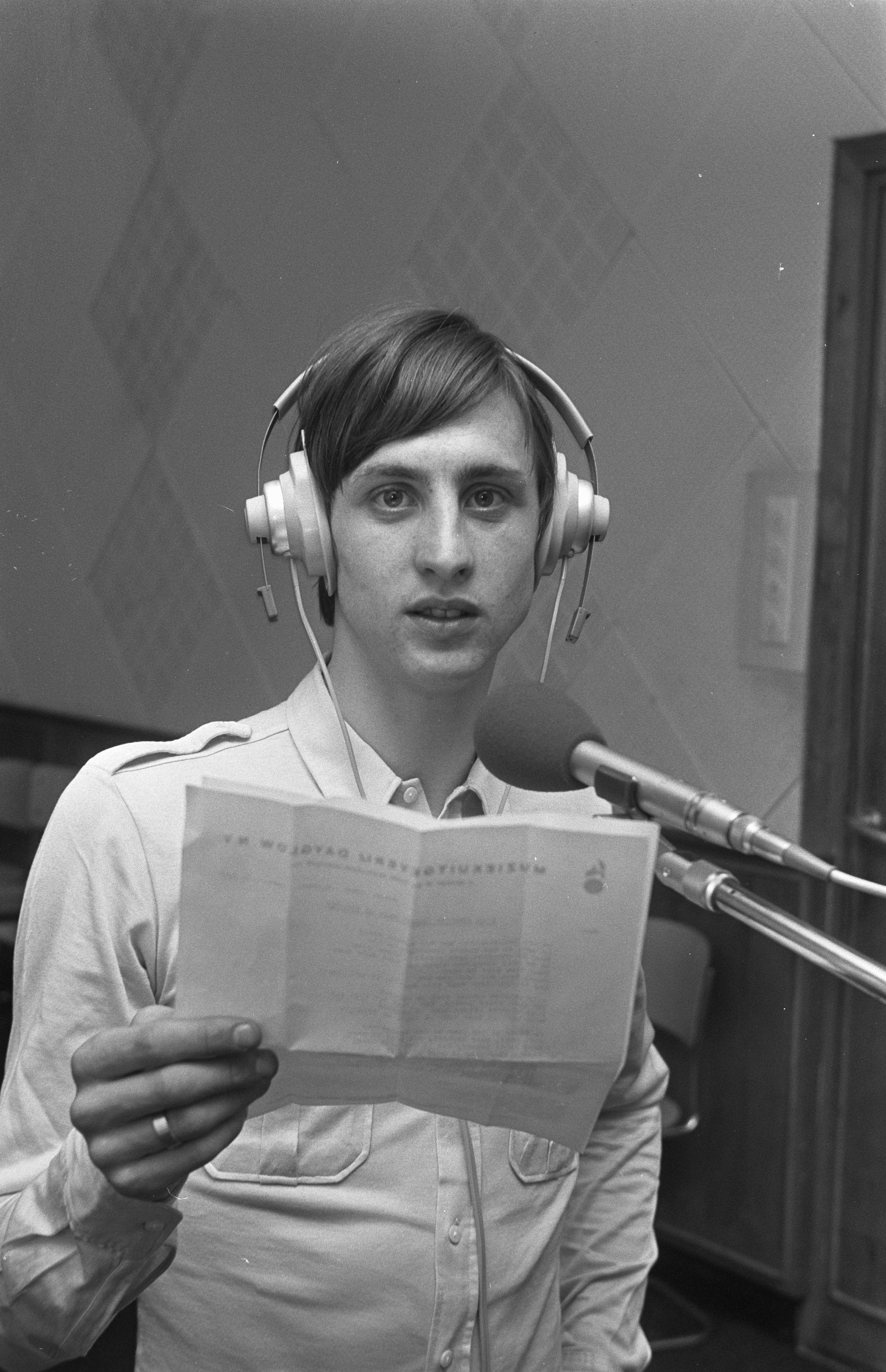 Collectie / Archief : Fotocollectie Anefo Reportage / Serie : [ onbekend ] Beschrijving : Johan Cruijff maakt grammofoonplaat in G.T.B. studio in Den Haag Johan Cruijff met koptelefoon tijdens opnamen Datum : 3 april 1969 Locatie : Den Haag, Zuid-Holland Trefwoorden : OPNAMEN, grammofoonplaten Persoonsnaam : Cruijff, Johan, G.T.b. Studio Fotograaf : Evers, Joost / Anefo Auteursrechthebbende : Nationaal Archief Materiaalsoort : Negatief (zwart/wit) Nummer archiefinventaris : bekijk toegang 2.24.01.05 Bestanddeelnummer : 922-2604